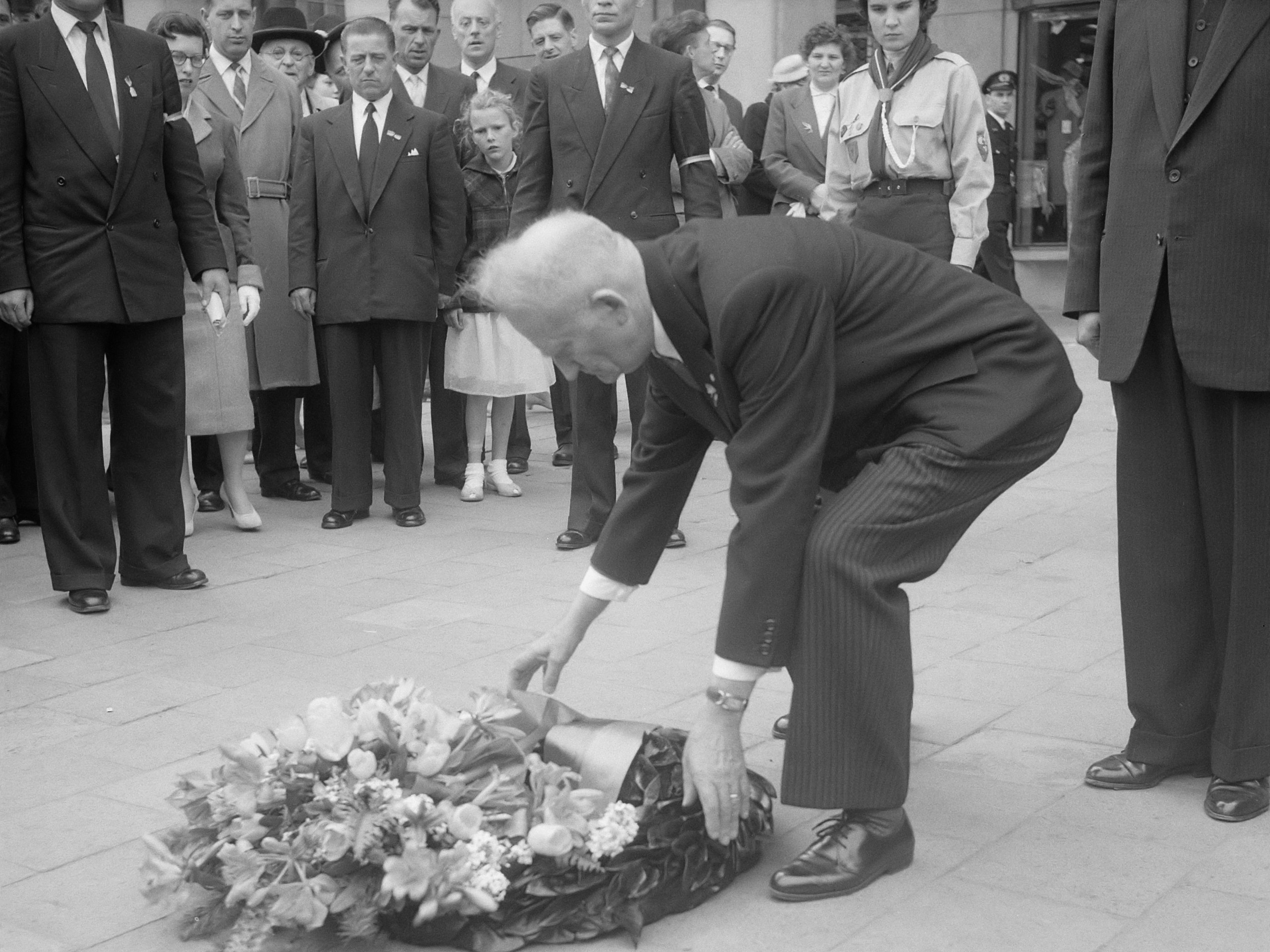 Herdenking bomaanslag op Ehwen Konowalets te Rotterdam 26 mei 1958